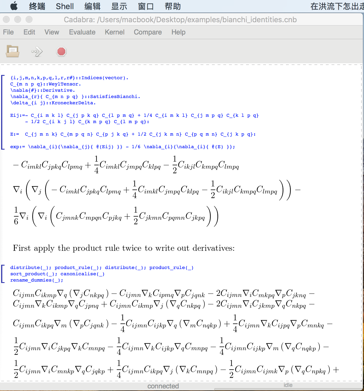 Mac环境下验证Bianchi identity。